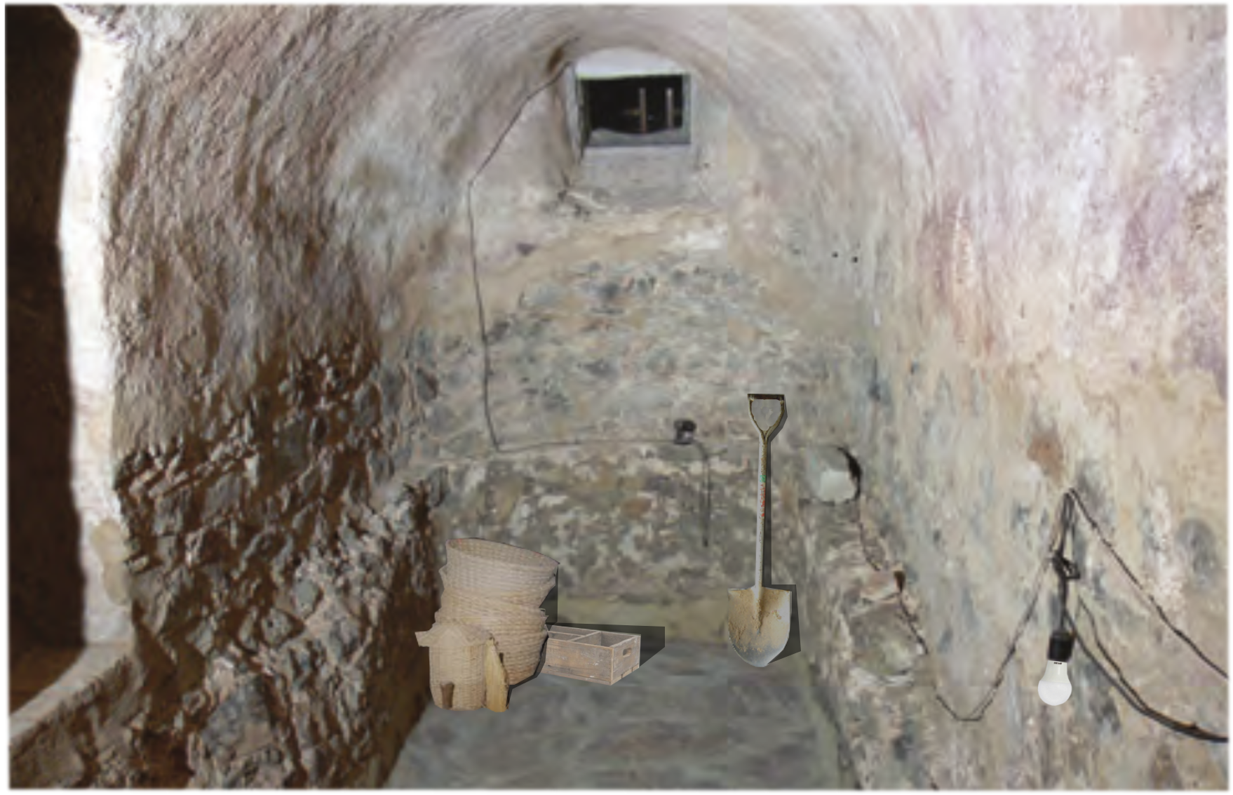 Grundmauern des östlichen Hufeisenturms des römischen Kastell Favianis (4. Jahrhundert) im Keller des Nikolaihofes (Mautern an der Donau).